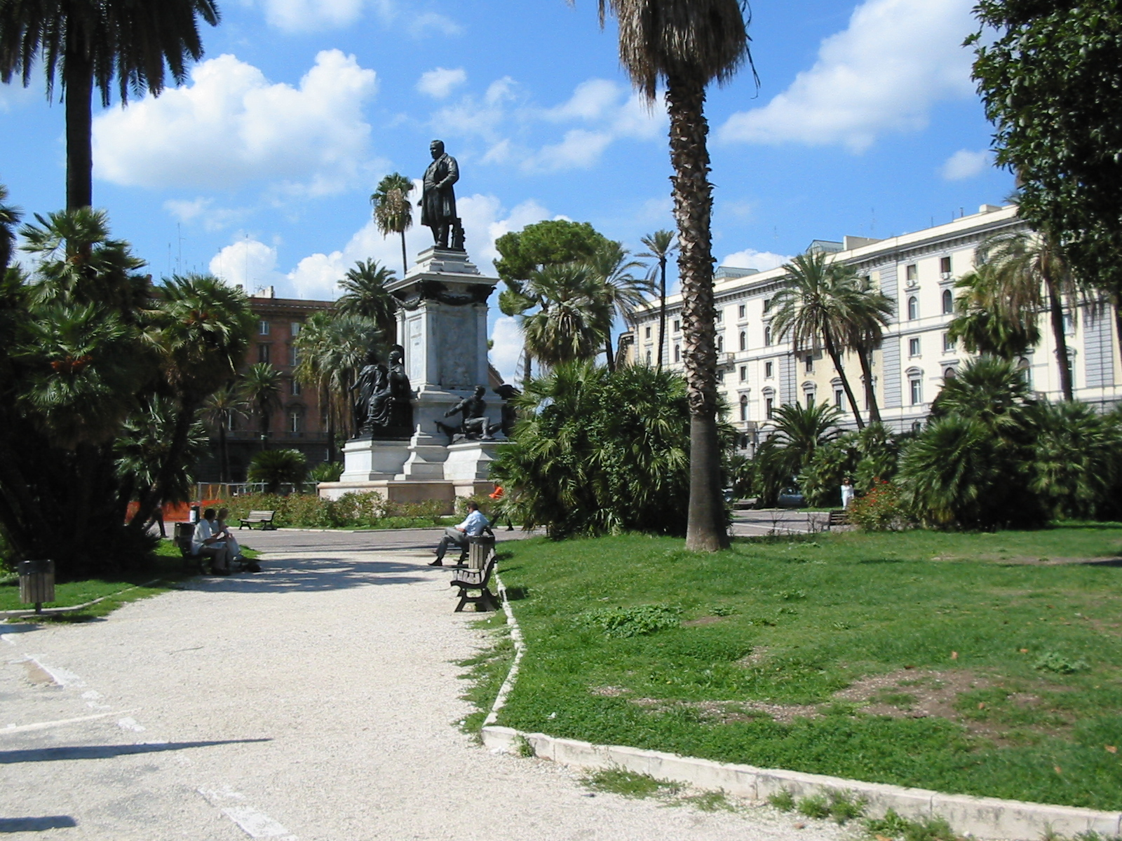 Piazza Cavour (Cavour Square) in Rome, Italy.